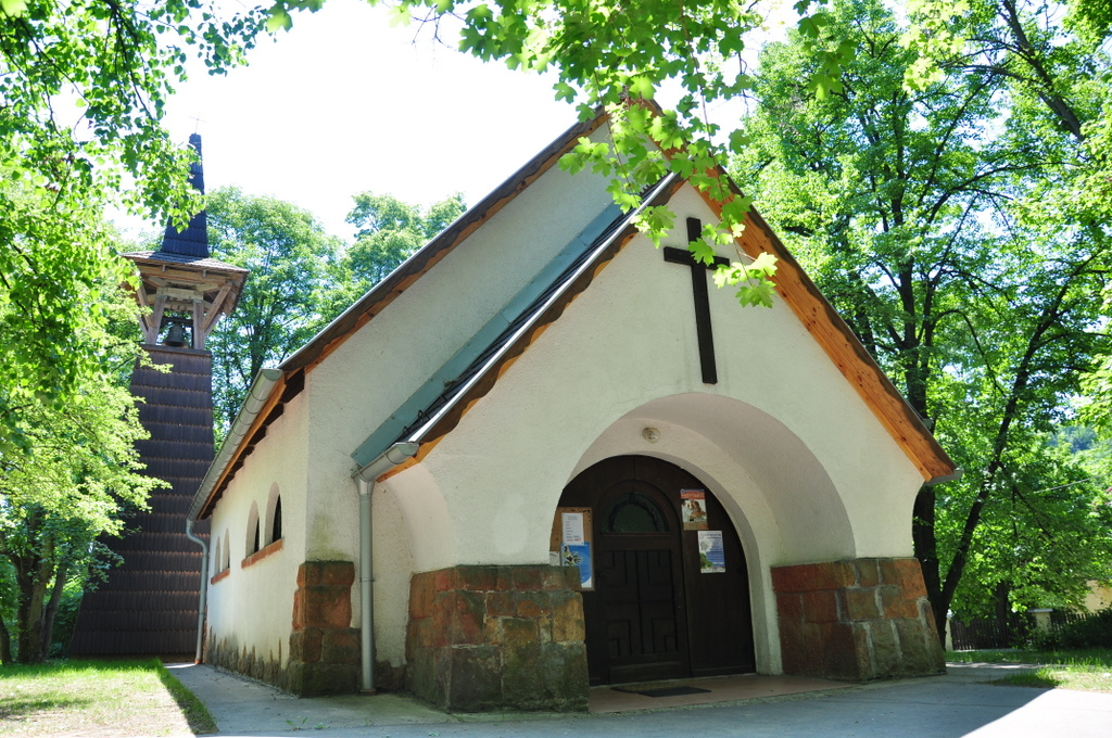 Saint Stephen church in Adyliget